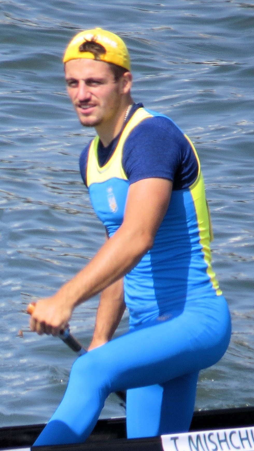 Sx50